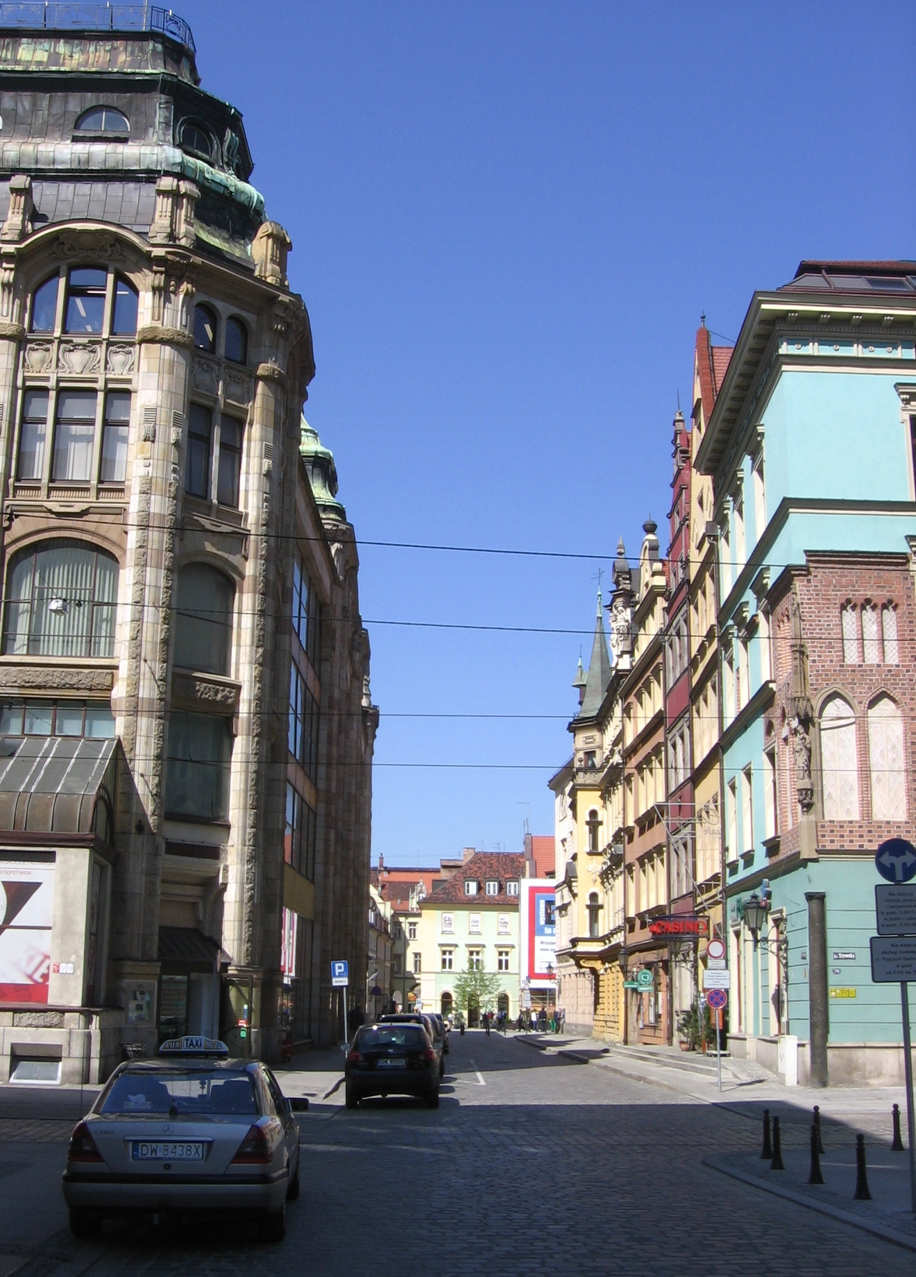 Kurzy Targ we Wrocławiu: widok od wschodu (w głębi Rynek)